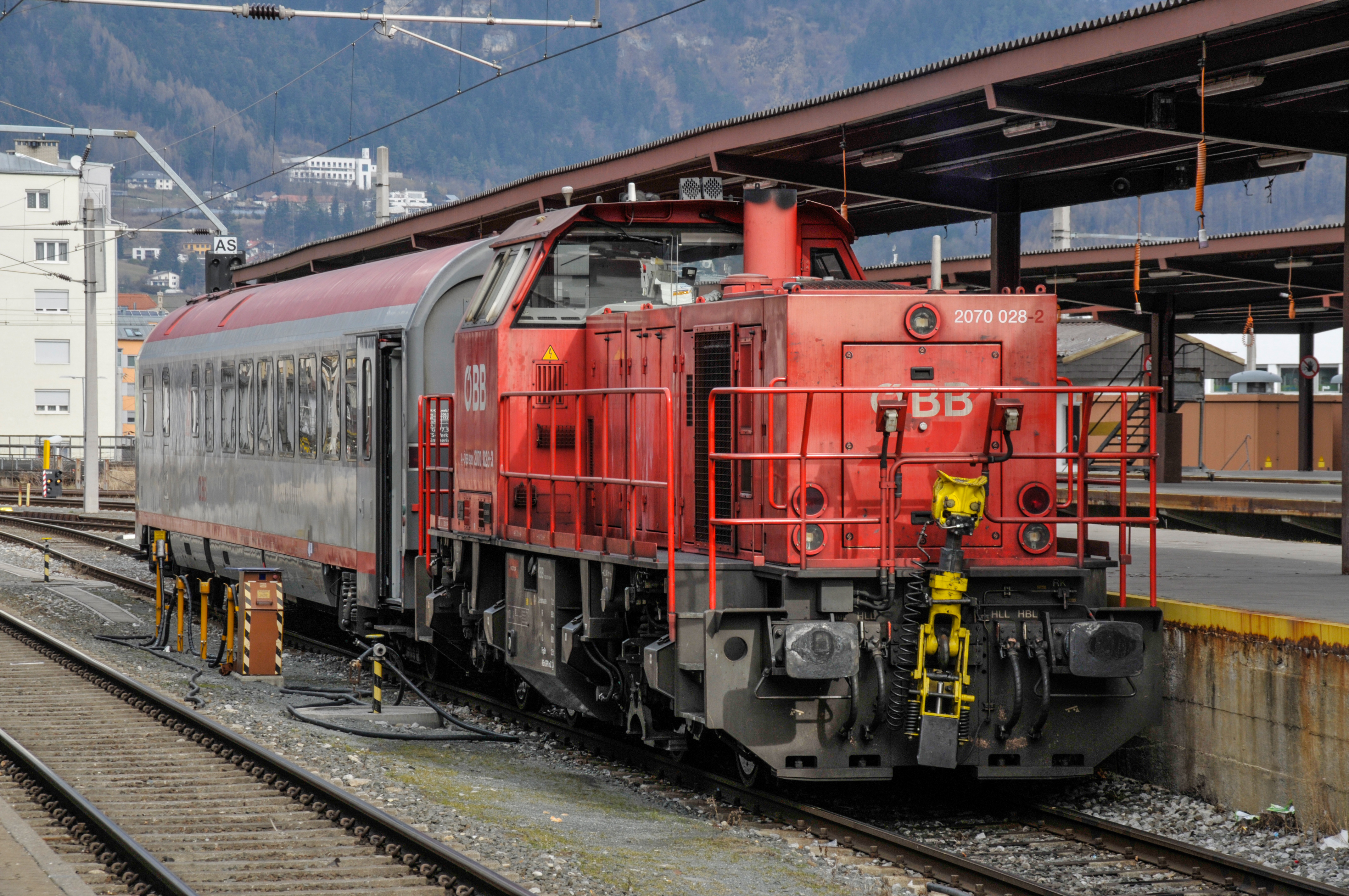 Rangierlokomotive ÖBB 2070 im Bahnhof Innsbruck Hauptbahnhof